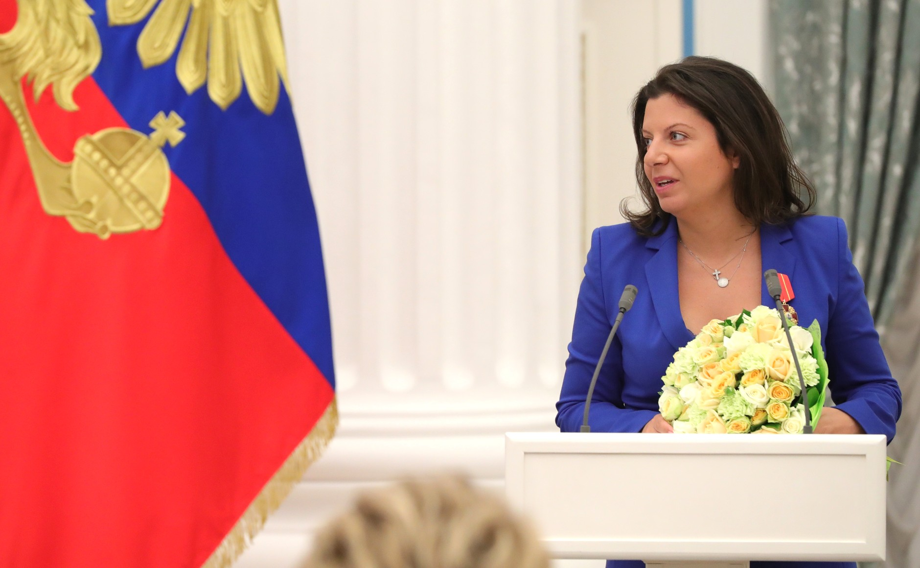 Орденом Александра Невского награждена главный редактор компании «ТВ-Новости» Маргарита Симоньян